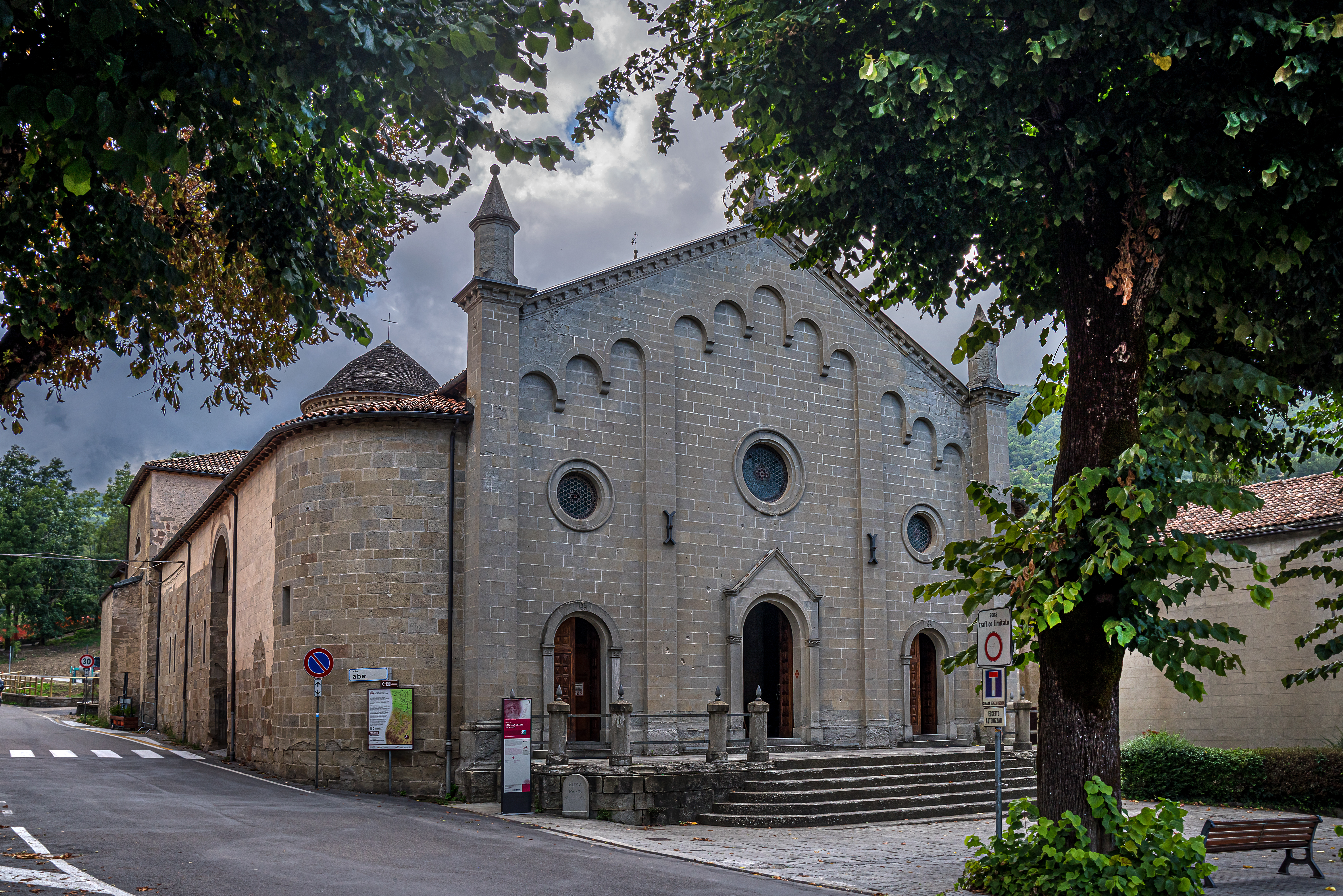 chiesa di San Silvestro papa This is a photo of a monument which is part of cultural heritage of Italy.